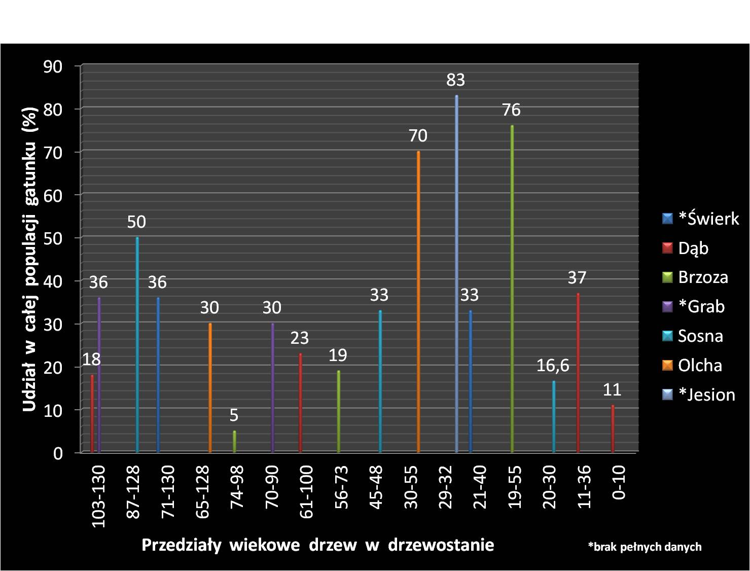 Autor: Adrian Grzegorz